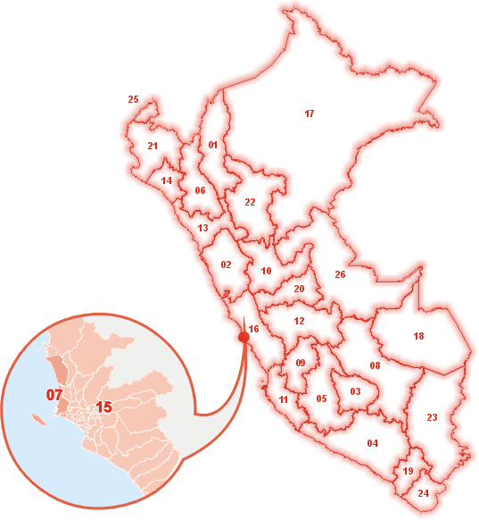 Mapa Político Administrativo del Perú Esta imagen es mia y la quiero cederla a Wikipedia. CASCANUECES 21:29 28 feb, 2005 (CET) Región 1 del Amazonas, Región 2 de Ancash, Región 3 de Apurímac, Región 4 de Arequipa, Región 5 de Ayacucho, Región 6 de Cajamarca, Región 7 del Callao, Región 8 de Cuzco, Región 9 de Huancavelica, Región 10 de Huánuco, Región 11 de Ica, Región 12 de Junín, Región 13 de La Libertad, Región 14 de Lambayeque, Región 15 de Lima Metropolitana, Región 16 de Lima, Región 17 de Loreto, Región 18 de Madre de Dios, Región 19 de Moquegua, Región 20 de Pasco, Región 21 de Piura, Región 22 de Puno, Región 23 de San Martín, Región 24 de Tacna, Región 25 de Tumbes, Región 26 de Ucayali.